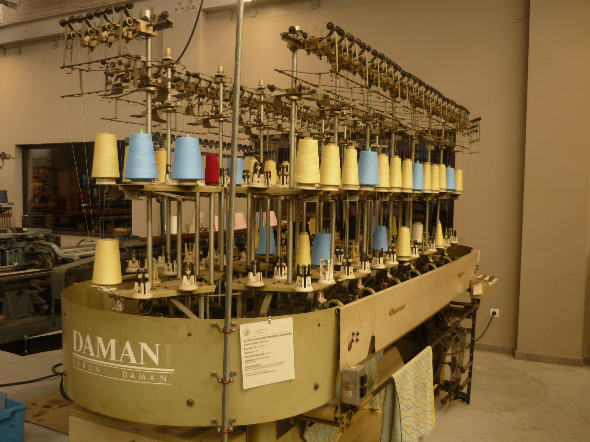 Tentoongesteld in het Breimuseum te Sint-Niklaas